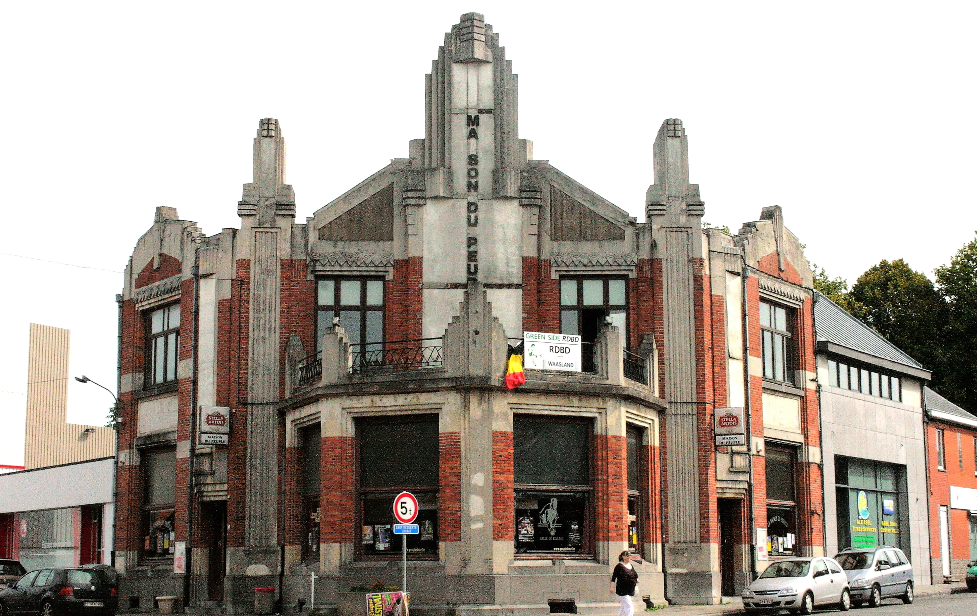 Dour, Belgique, Maison du Peuple